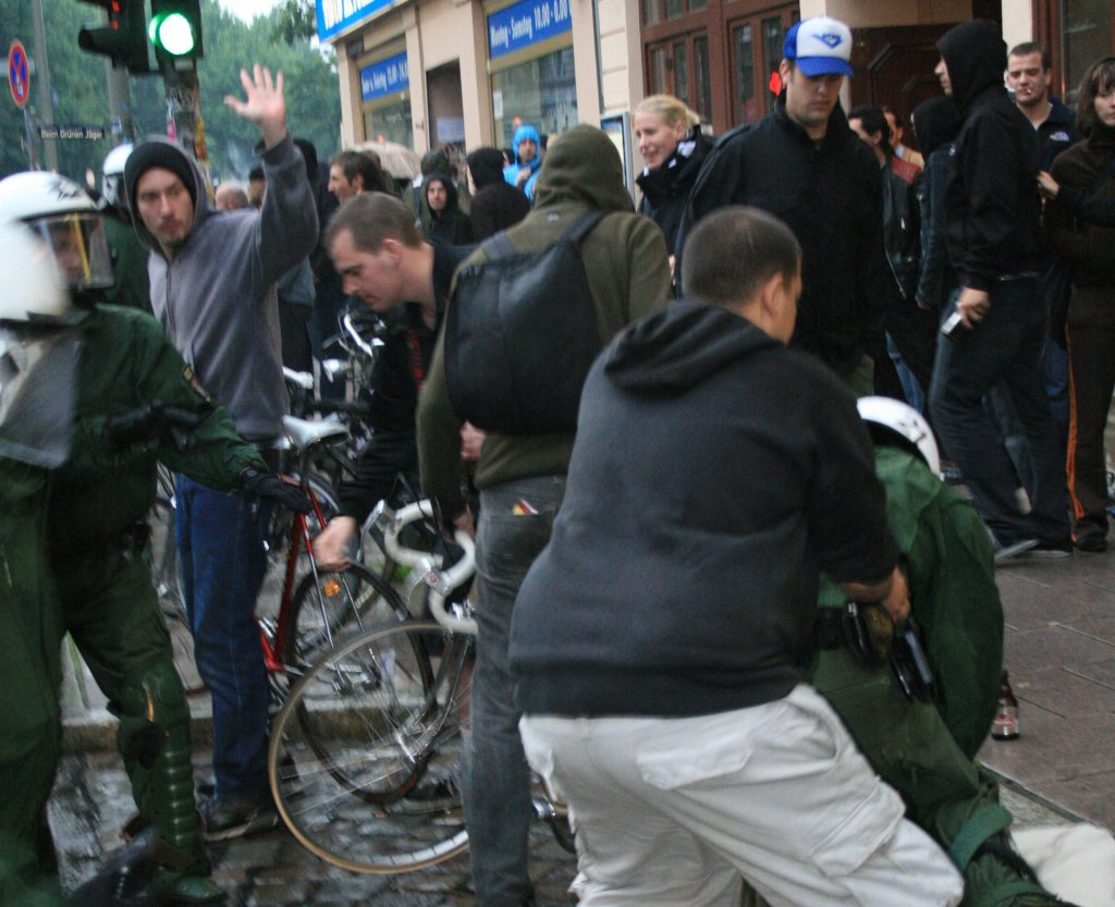 'Autonomer' greift Polizeiwaffe Hamburg, 28. Mai 2007